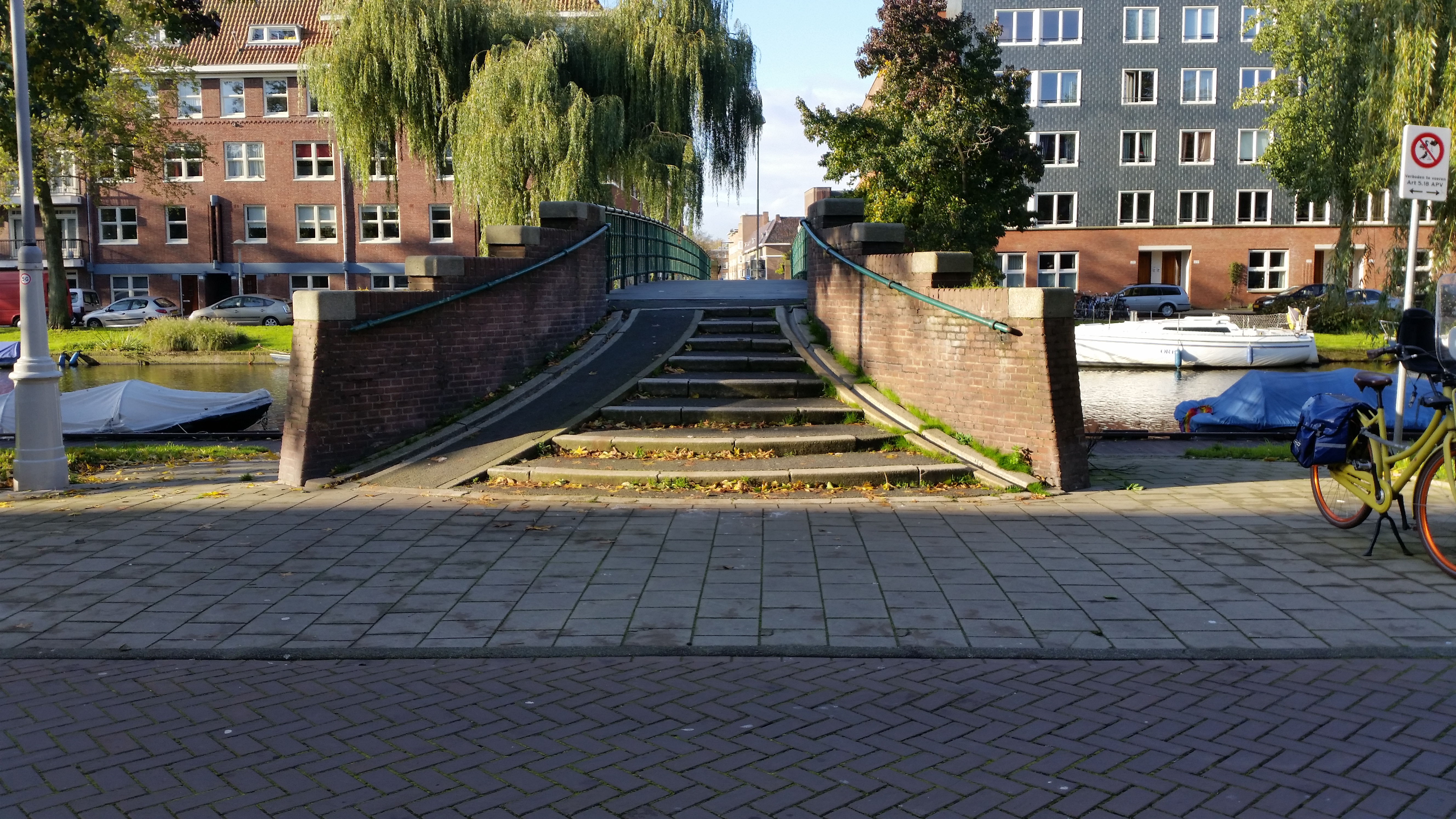 Brug 129 met de naam Groentepraambrug is een voetbrug over de Admiralengracht, Amsterdam-West